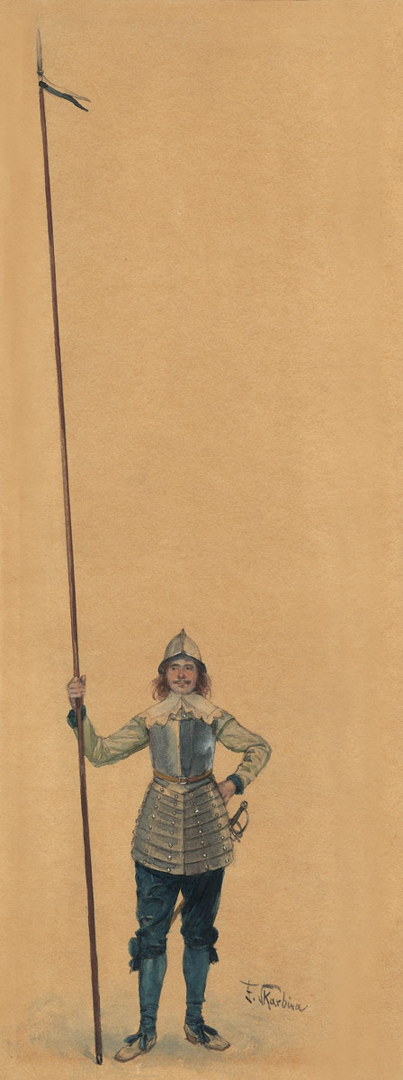 Franz Skarbina: Stehender Pikenier mit Lanze. Aquarell. 45,5 x 17,6 cm